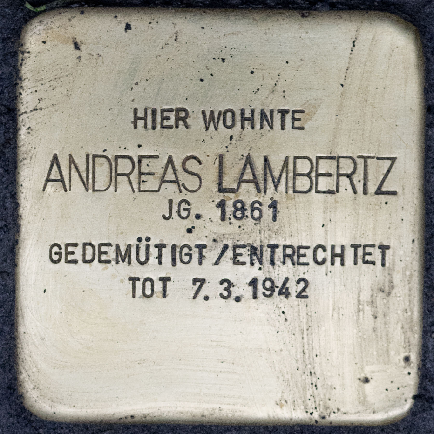 Stolpersteine Kempen: Andreas Lambertz